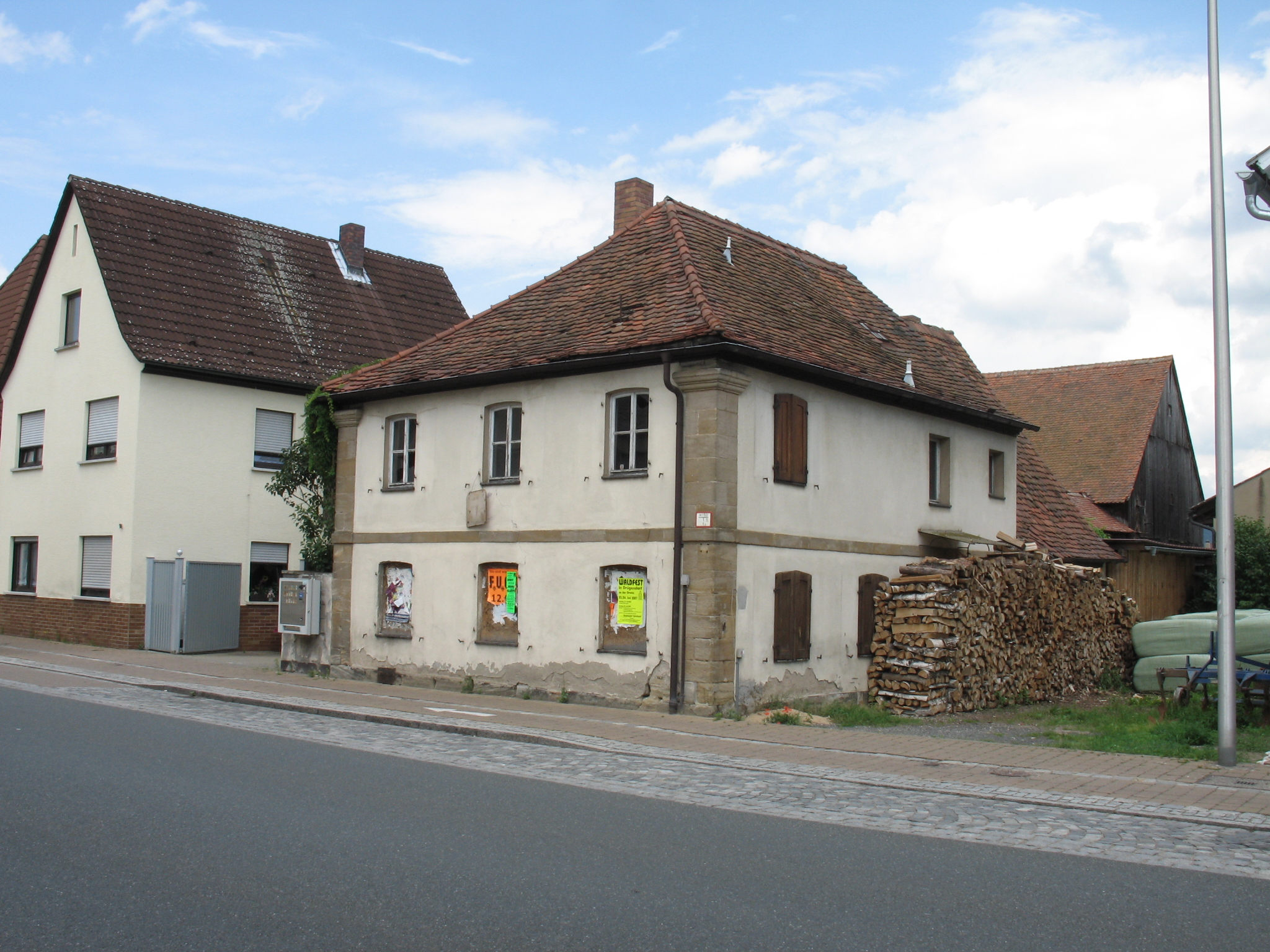 Hirschaid, ehem. Judenschule (Nürnberger Str. 12).